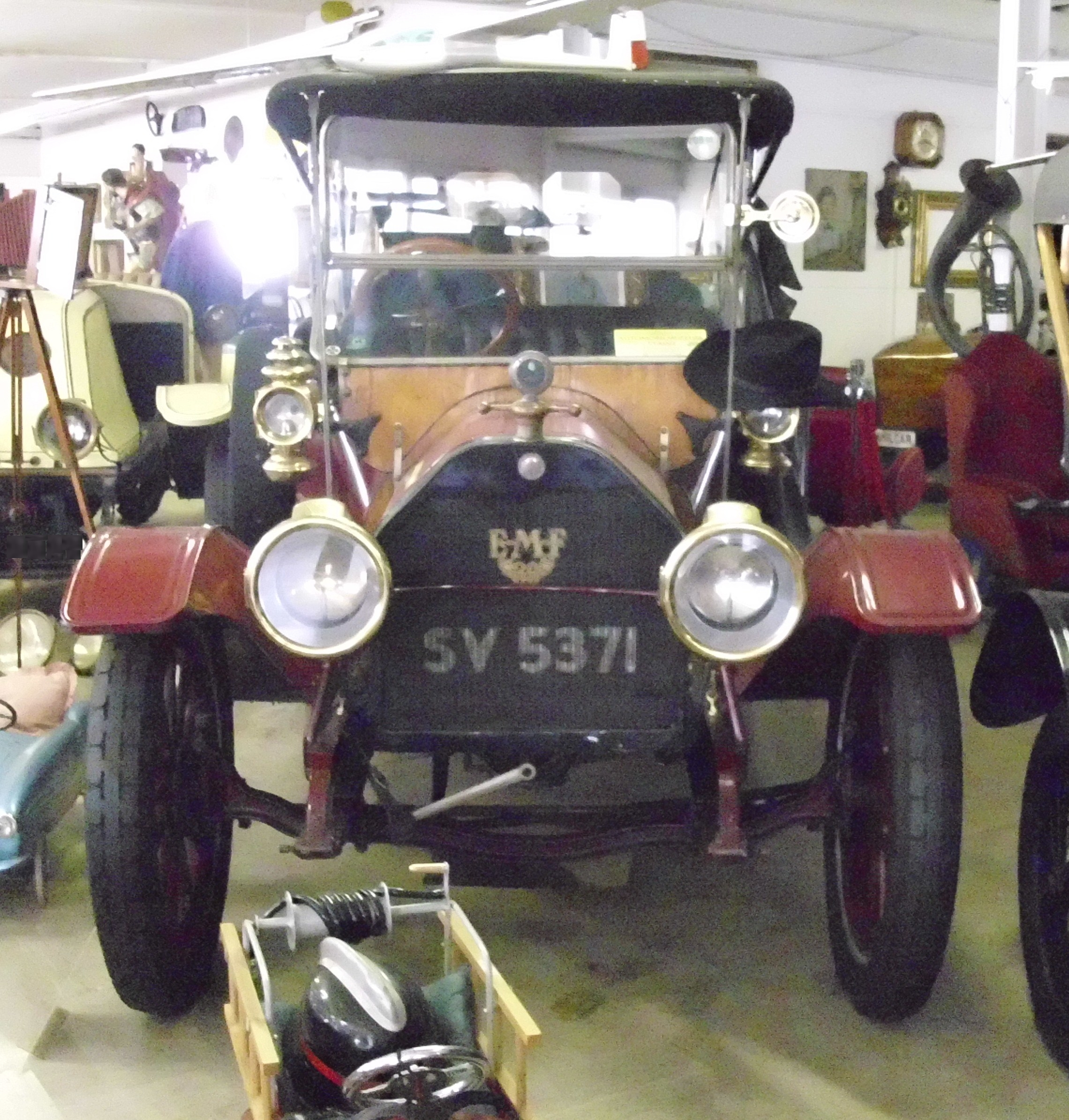 EMF 1912 im Automobilmuseum Stainz